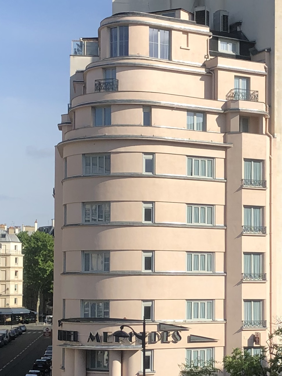 Façade Hôtel Mercedes, Architecte: P Patout (1928), 128 avenue de Wagram, Paris 17